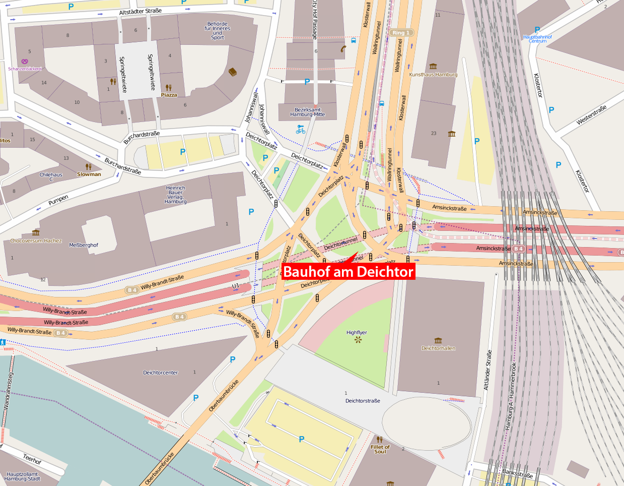 Karte des Bauhofs am Deichtor in Hamburg, Deutschland.